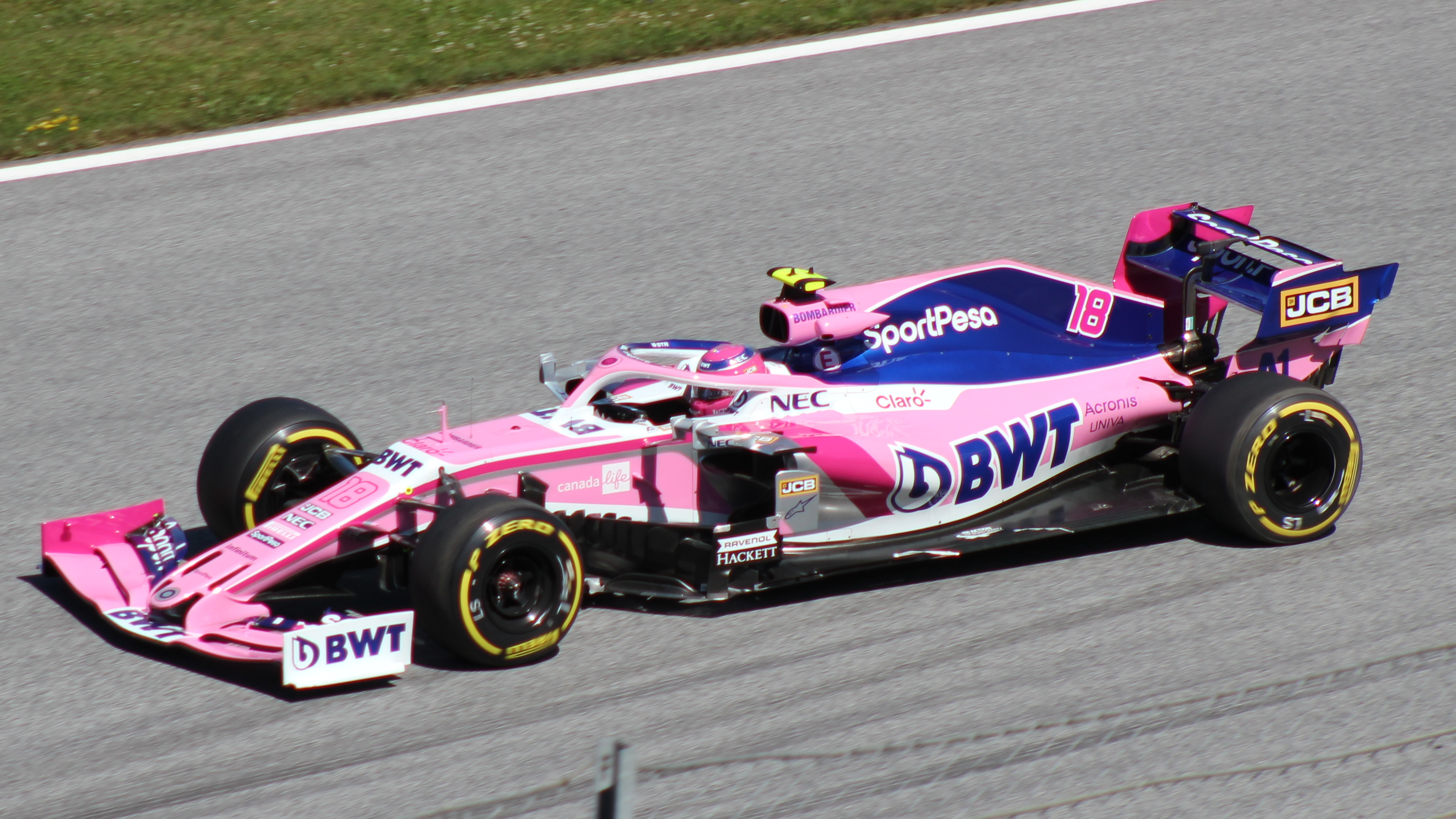 Stroll beim Rennwochenende in Österreich 2019